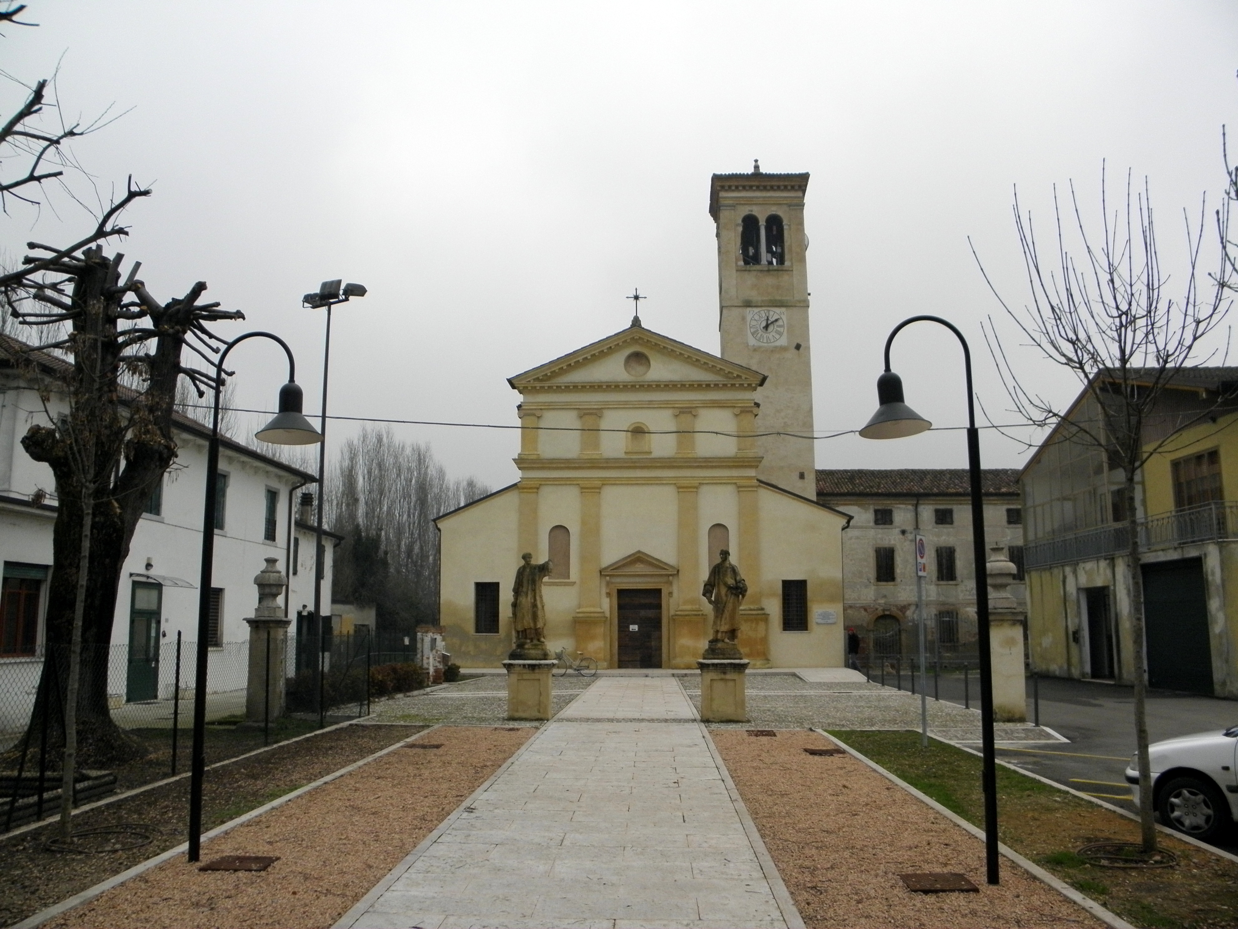 Concamarise, il piazzale con la vecchia chiesa parrocchiale dei Santi martiri Lorenzo e Stefano.